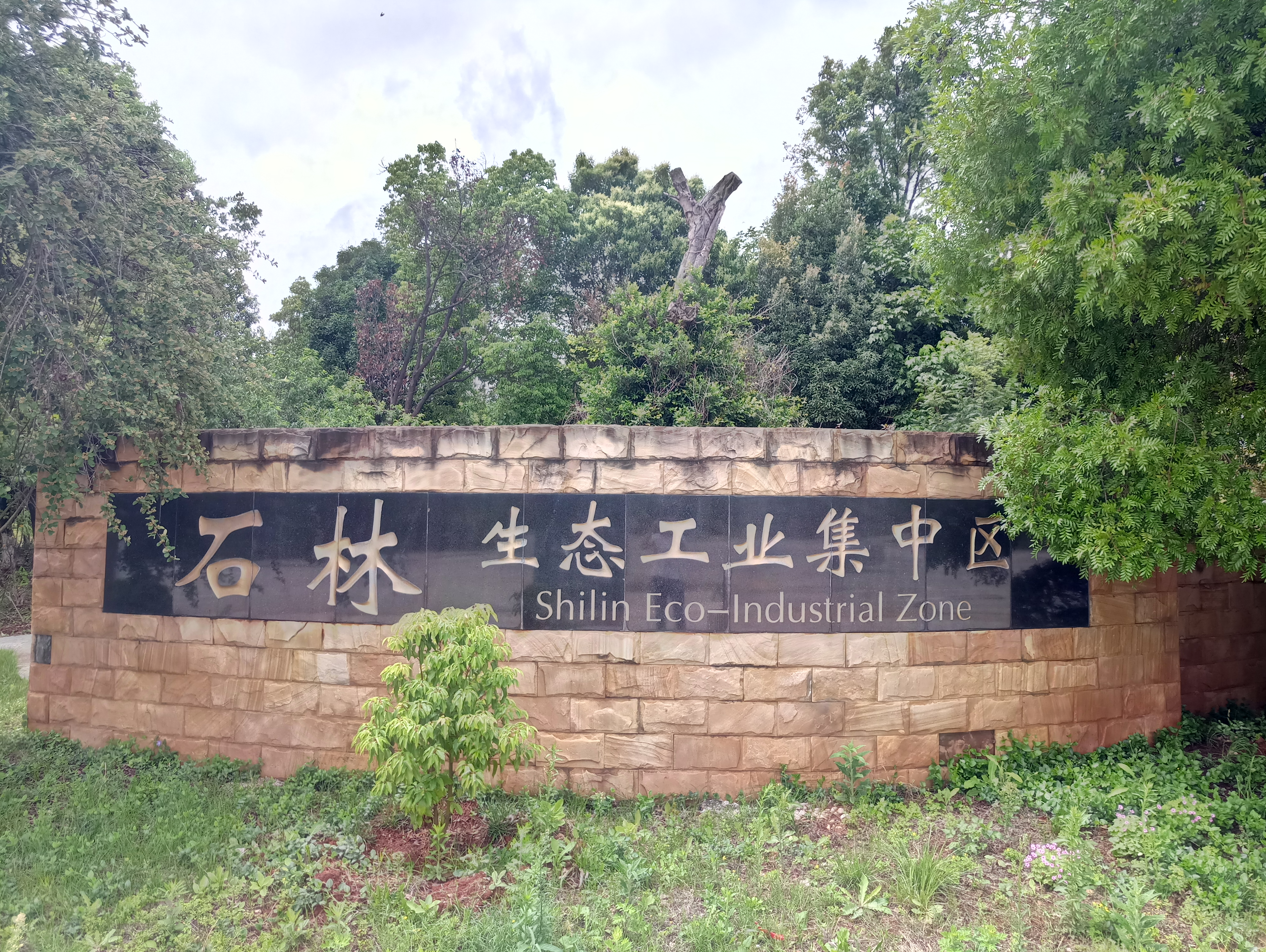 中文（中国大陆）: 石林生态工业集中区